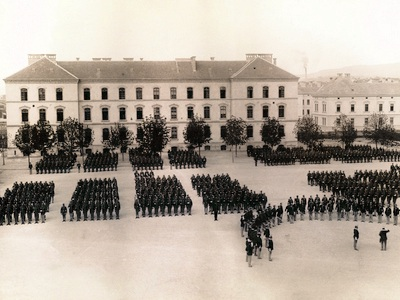 Vježba vojnika pred Rudolfovom vojarnom, poč. 20. stoljeća